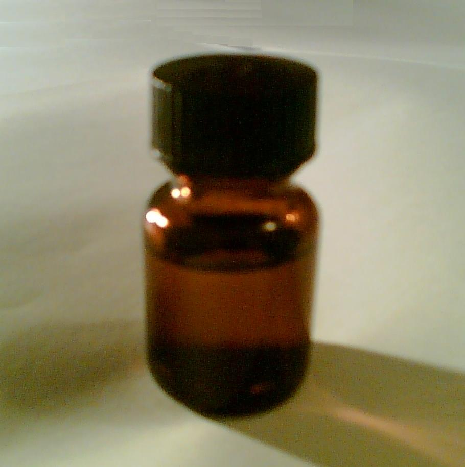 een flesje poppers